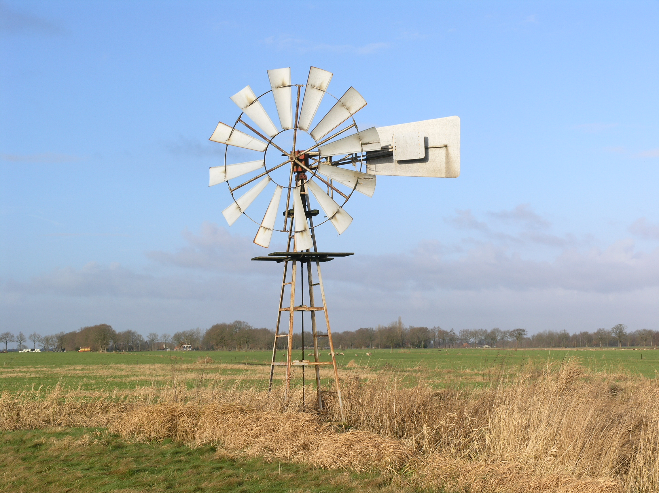 De Hoeve Windmotor Poldermolen